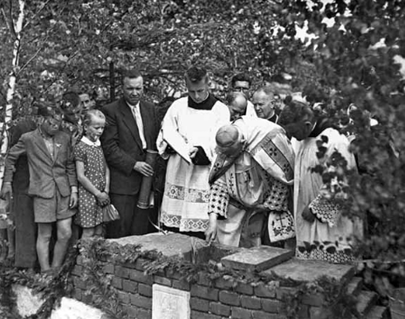 Wmurowanie kamienia węgielnego przez biskupa przemyskiego w mury powstającego kościoła Imienia Maryi w Bączalu Dolnym